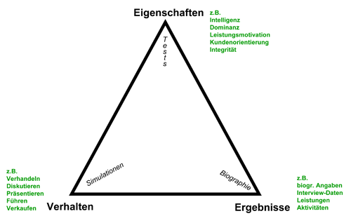 Illustration Prinzip Multi-Methodalität